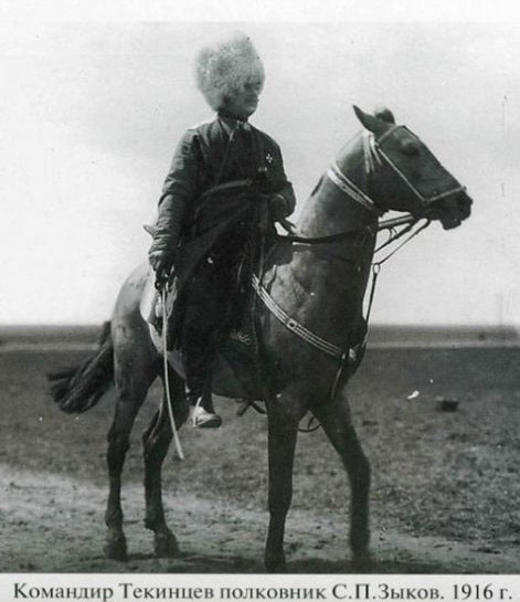 Зыков Сергей Петрович - командир Текинского полка